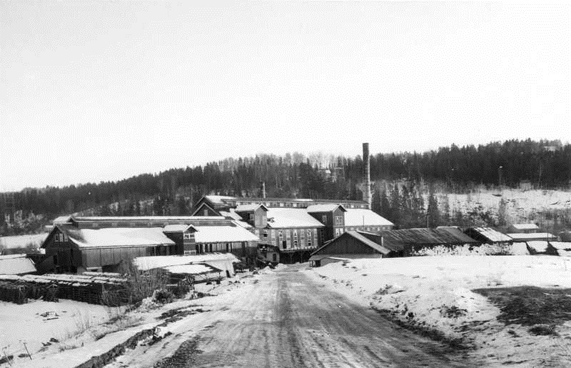 Alna teglverk på Alna i Oslo, kulturlandskap, skog, snø.